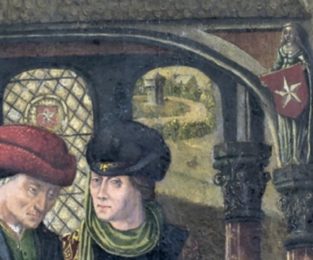 Detail van het Gerechtigheidspaneel of De dubbele gerechtigheid (Jan van Brussel, ca. 1475), voorheen in het Stadhuis van Maastricht, sinds 2018 in het Bonnefantenmuseum. Hier het linkerdeel van het onderste deel met de menselijke gerechtigheid. Afgebeeld is een laat-15e-eeuwse rechtbank met rechts een rijke en een arme aangeklaagde.